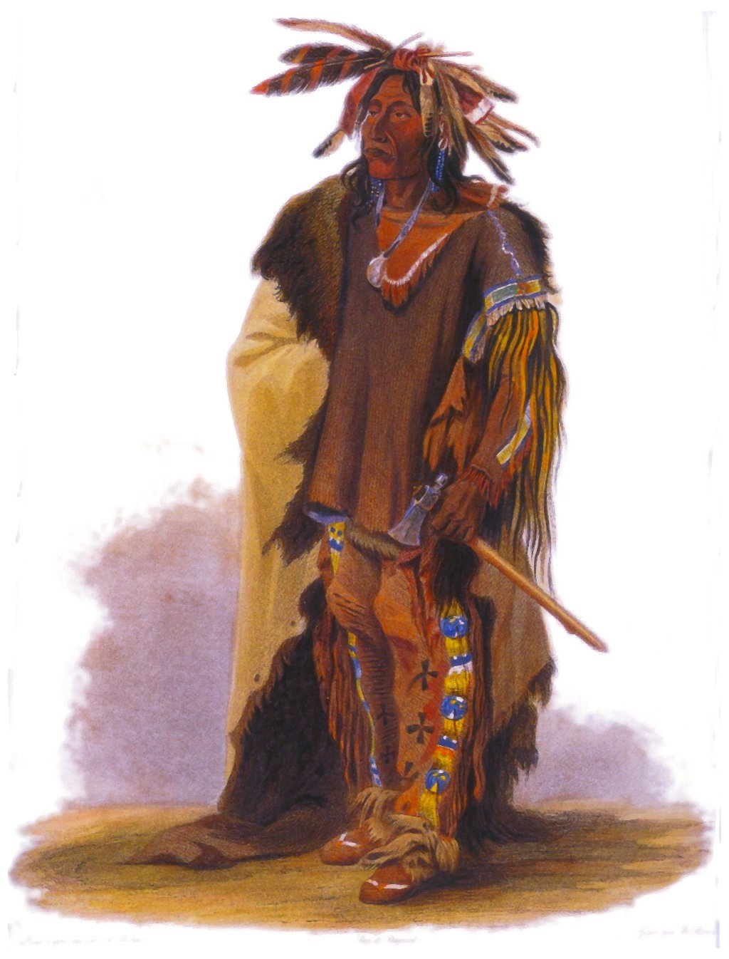 Dakota warrior